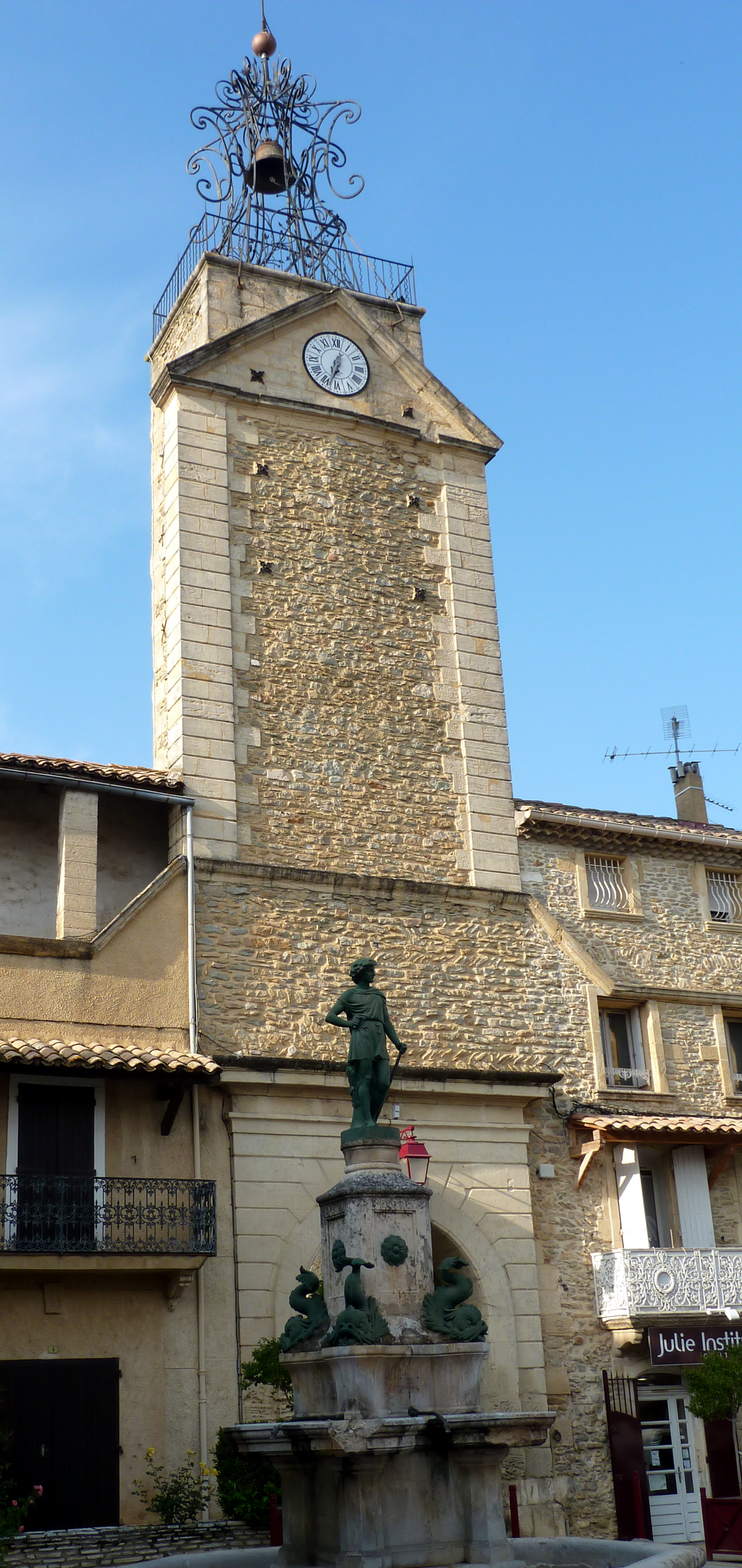 Tour de l'horloge de Connaux, commune située dans le Gard (France).